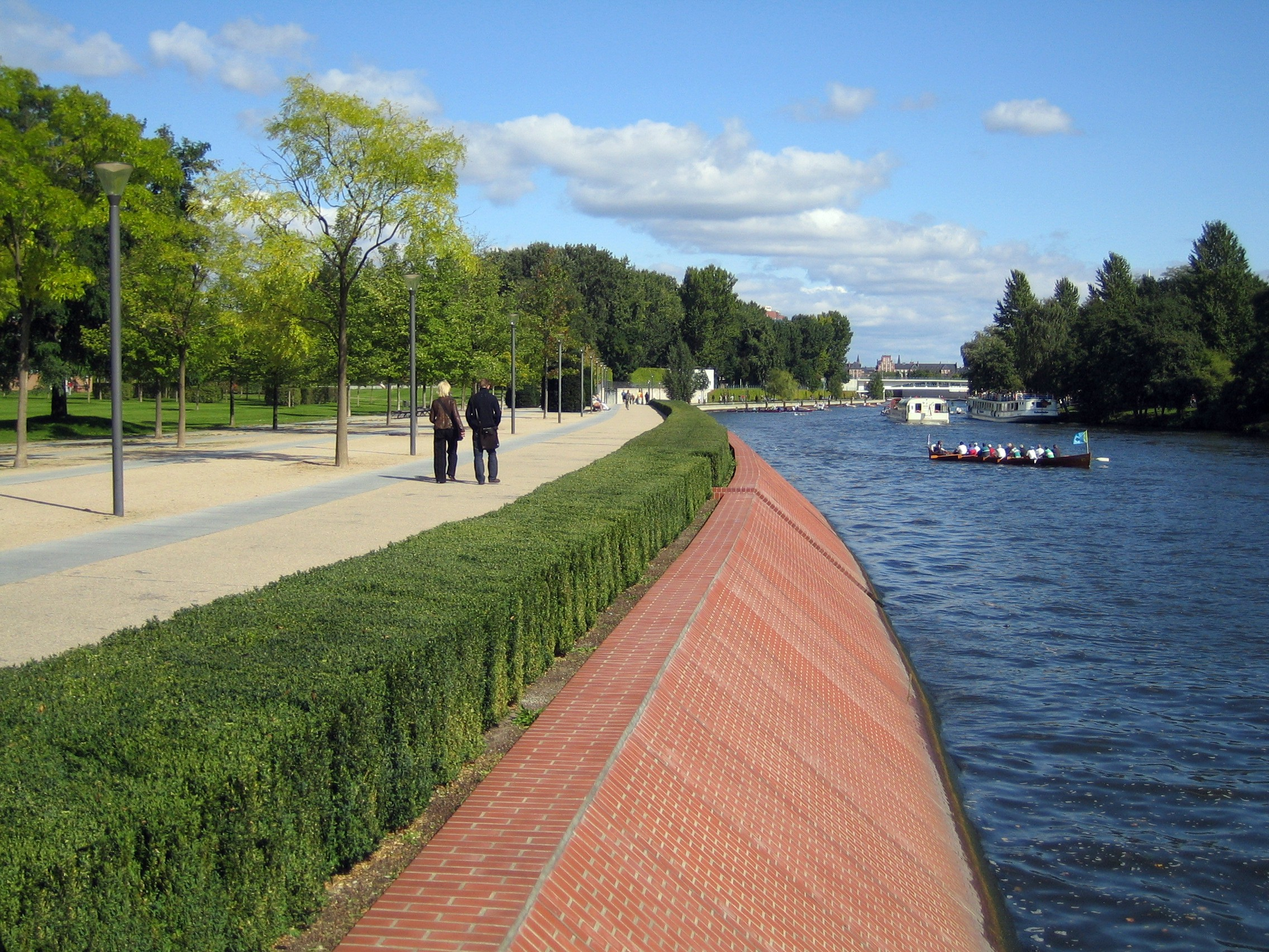 Berlin, Spreebogen zwischen Schloss Bellevue und Kanzleramt.